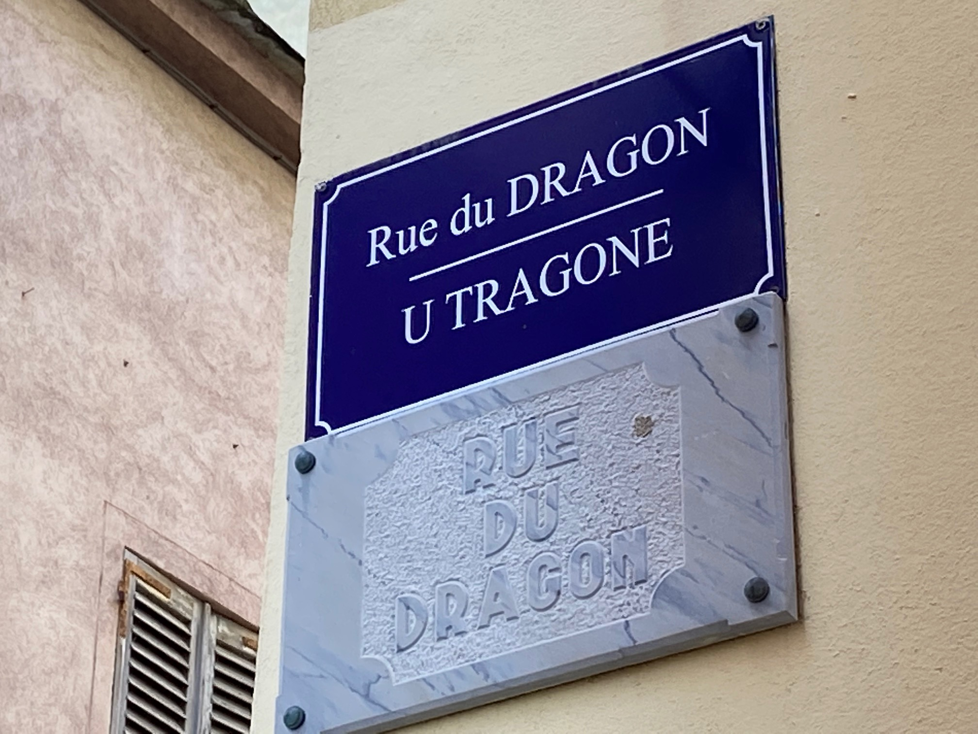 Corsu: Tupunimia bislingua corsu è francese pè i carrughji di a citatella di Bastia.